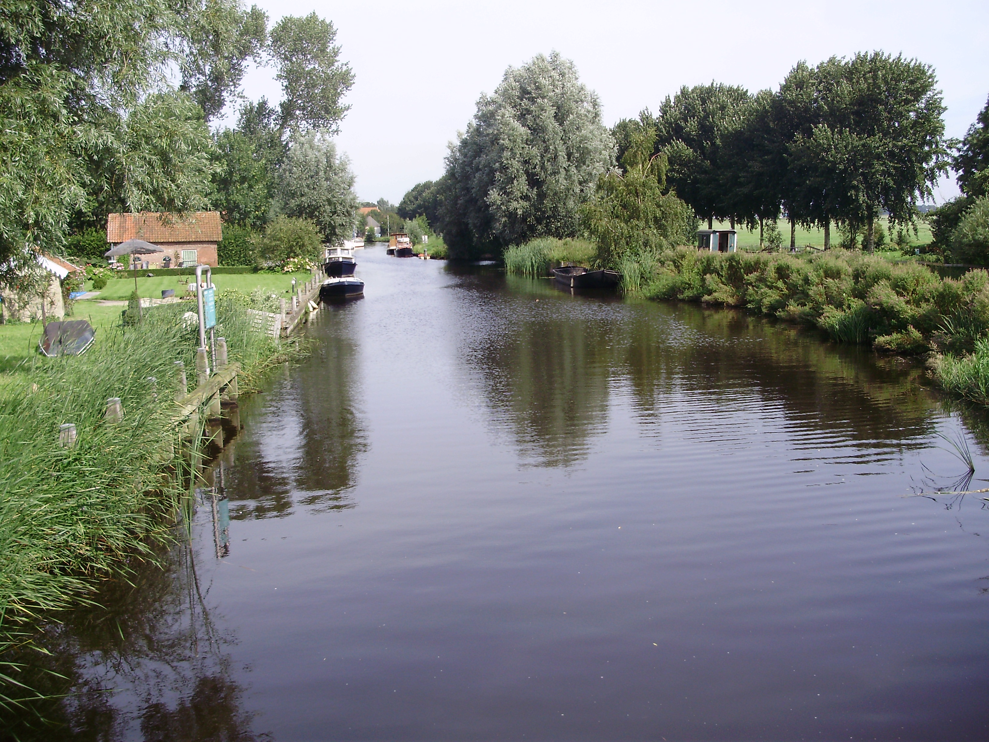 Het Ges bij Oppenhuizen, gemeente Súdwest Fryslân